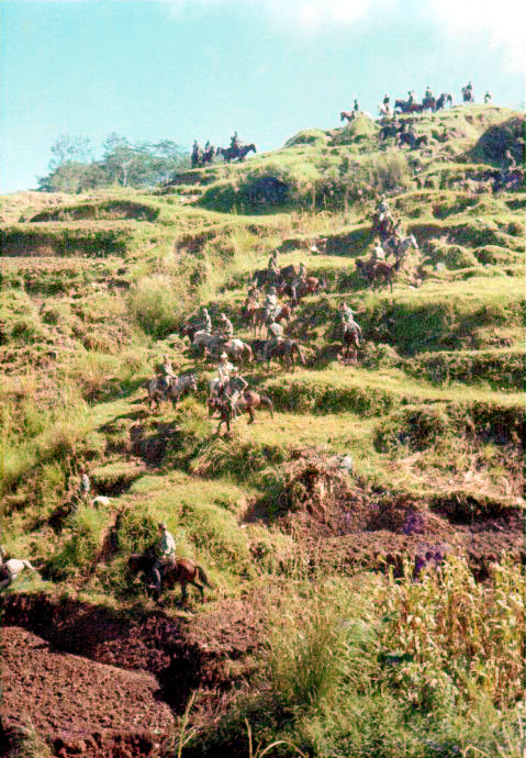 A cavalo pelas montanhas de Atsabe